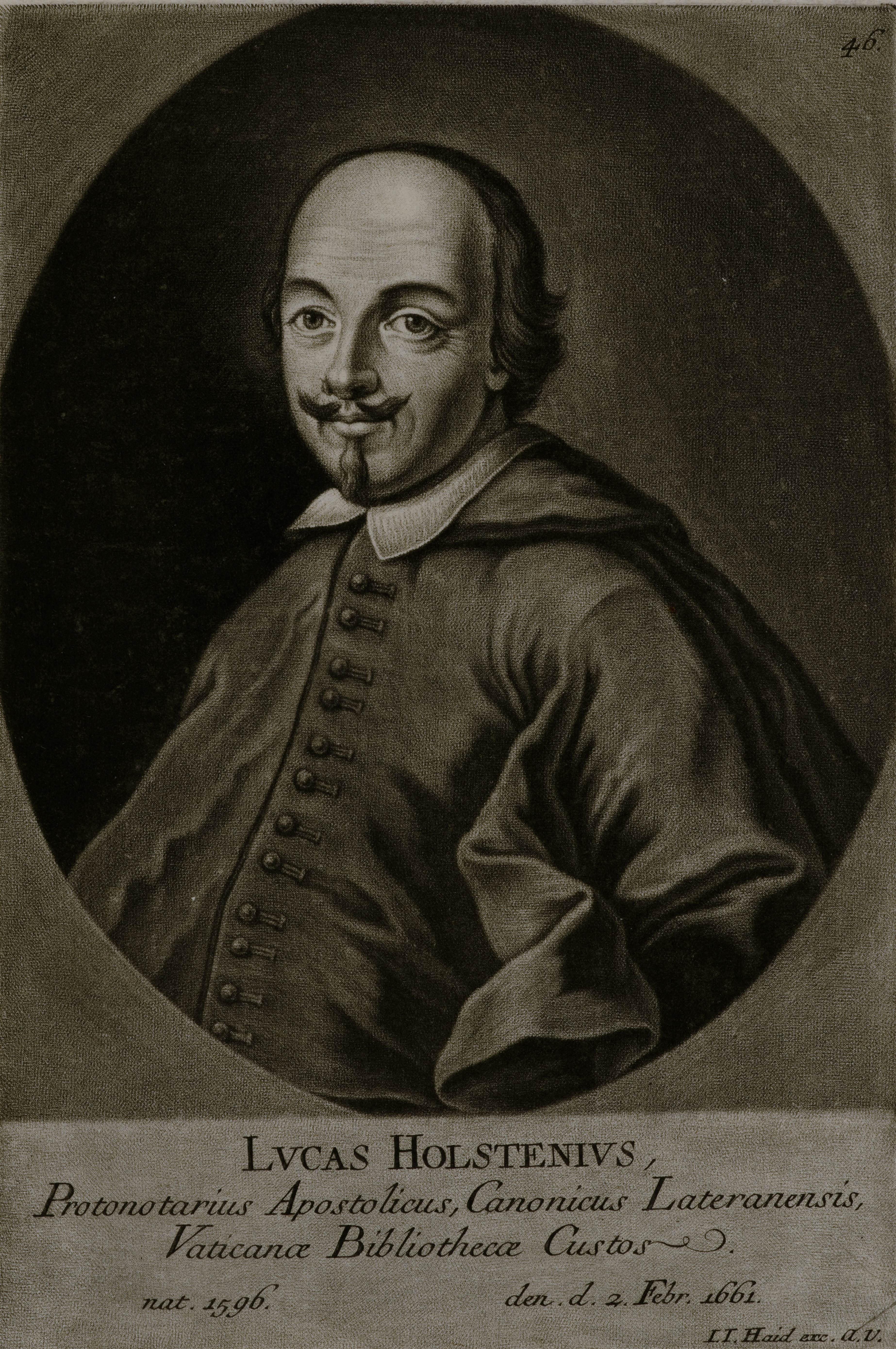 Lvcas Holstenivs